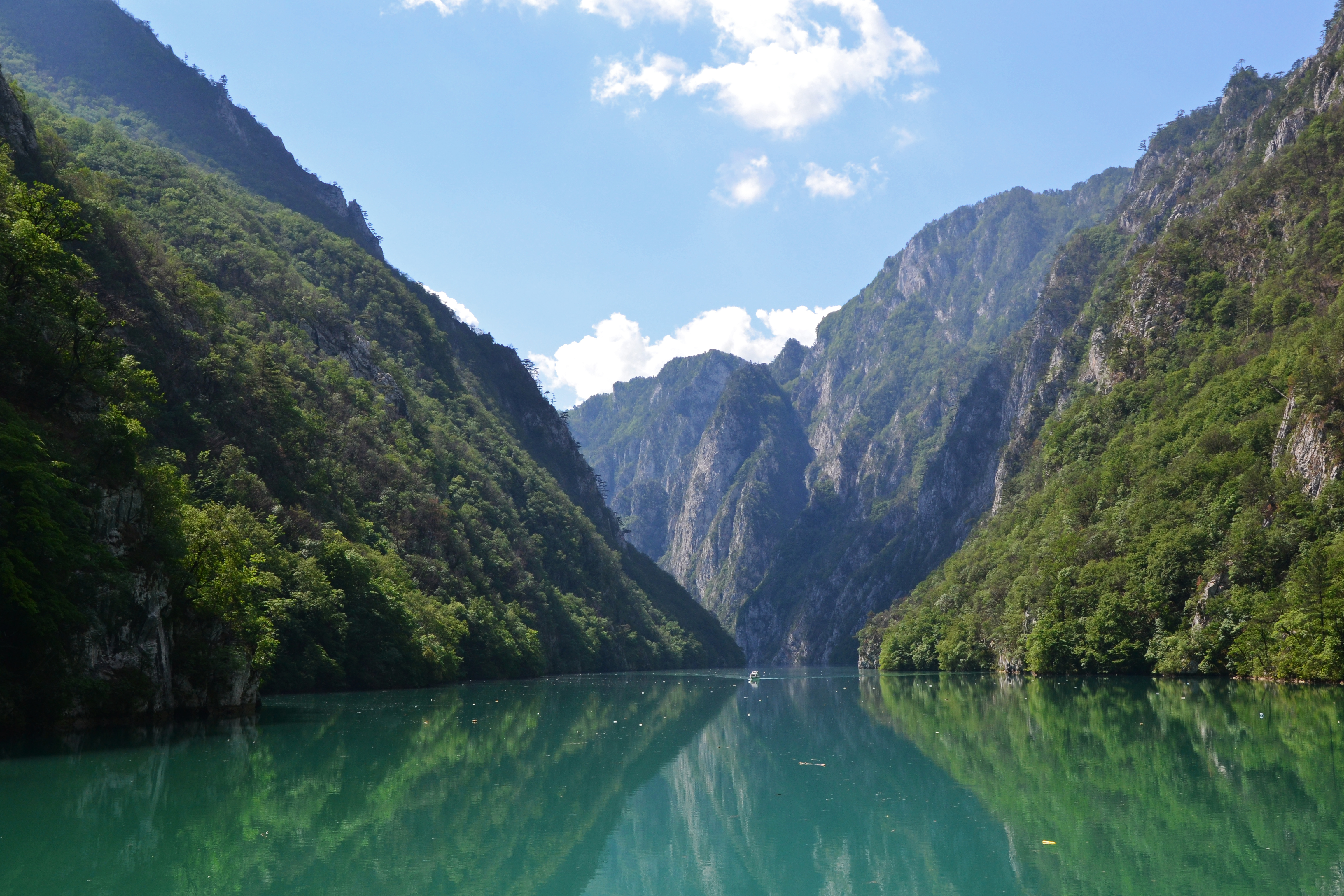 Srpskohrvatski / српскохрватски: Сликава е подигната во рамките на проектот „По трагата на душата 2015“.